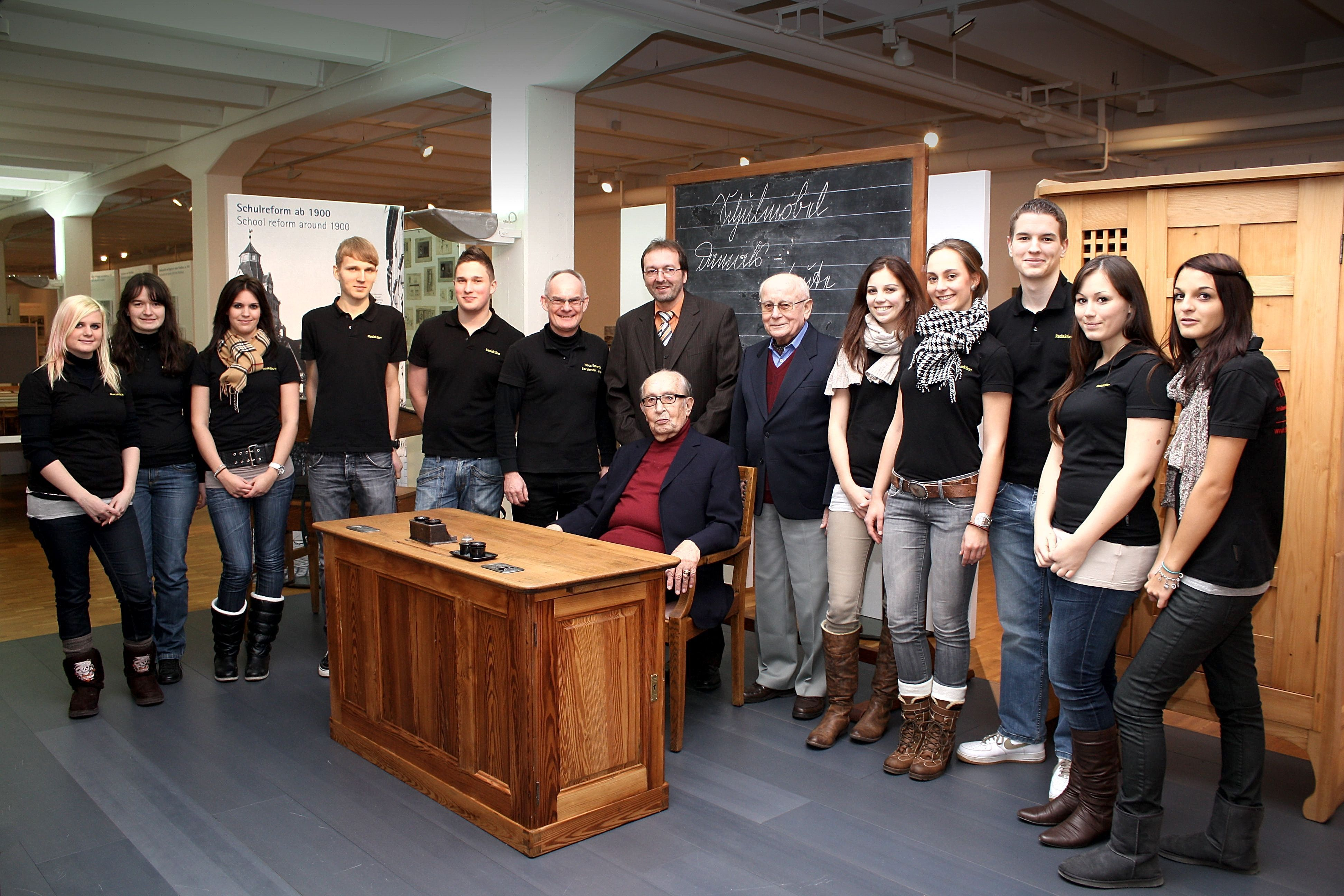 Die Financial T(’a)ime, Schülerzeitung der Kaufmännischen Schule Tauberbischofsheim, trifft Bruno Rottenbach, einen fast hundertjährigen Artikelschreiber, im VS Museum in Tauberbischofsheim.